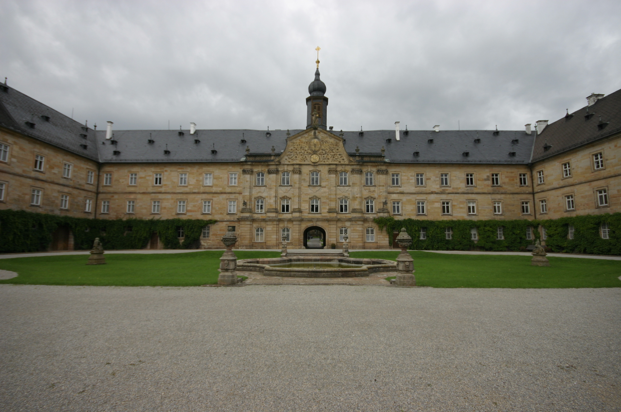 Blick auf das Schloß Tambach vom Ehrenhof gesehen